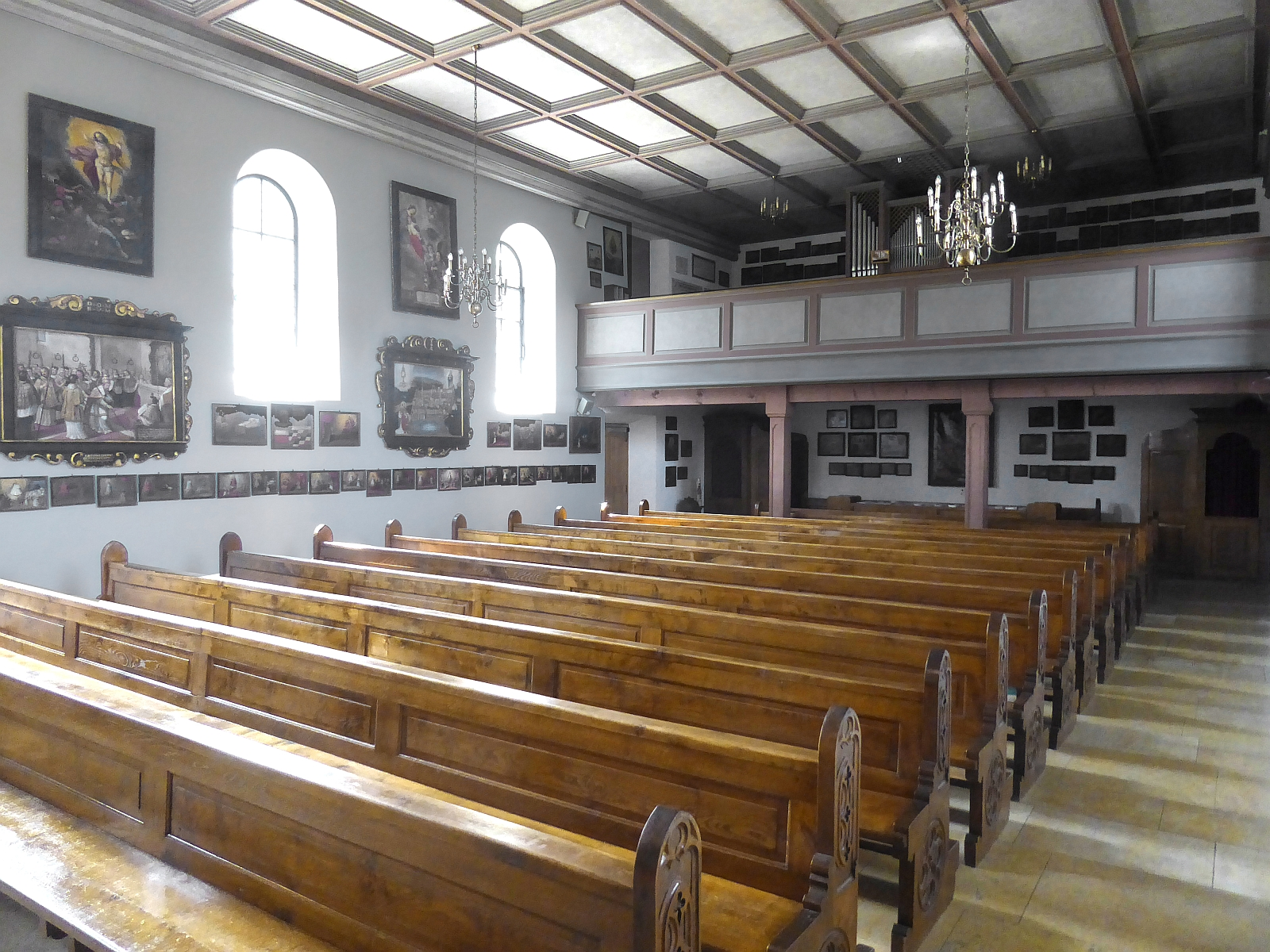 Innenansicht Chapelle du Vorbourg